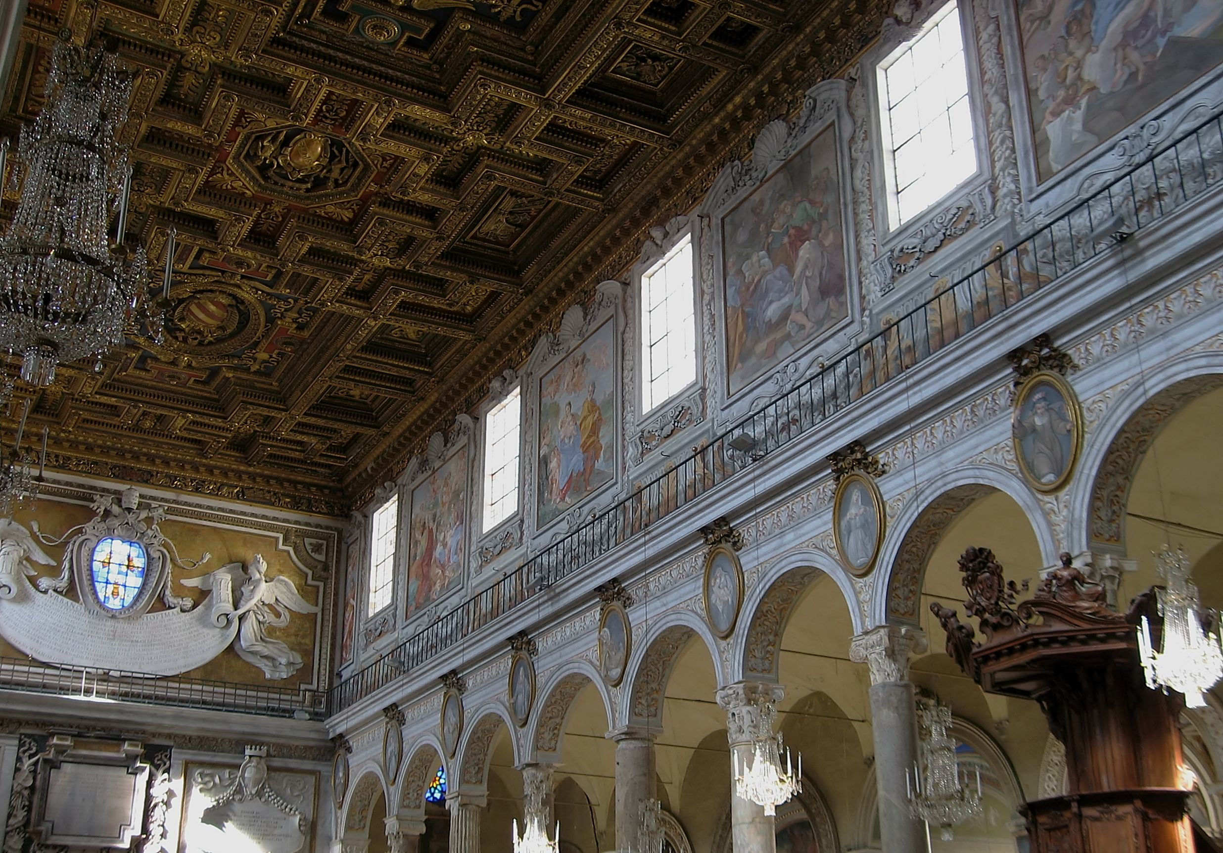 Santa Maria Maggiore in Rom/Italien - Kircheninnenraum